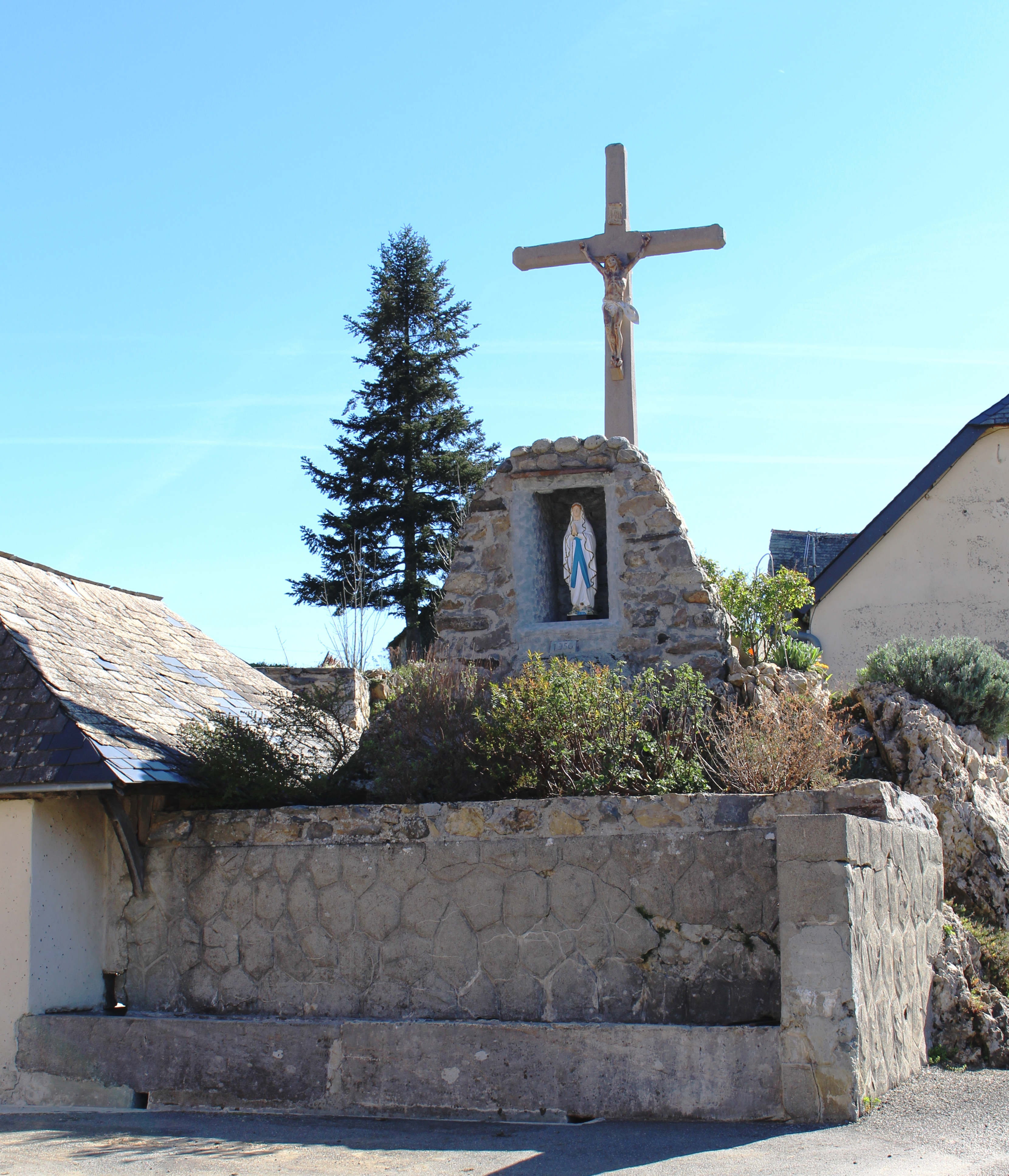 Fontaine de Sère-Lanso (Hautes-Pyrénées)